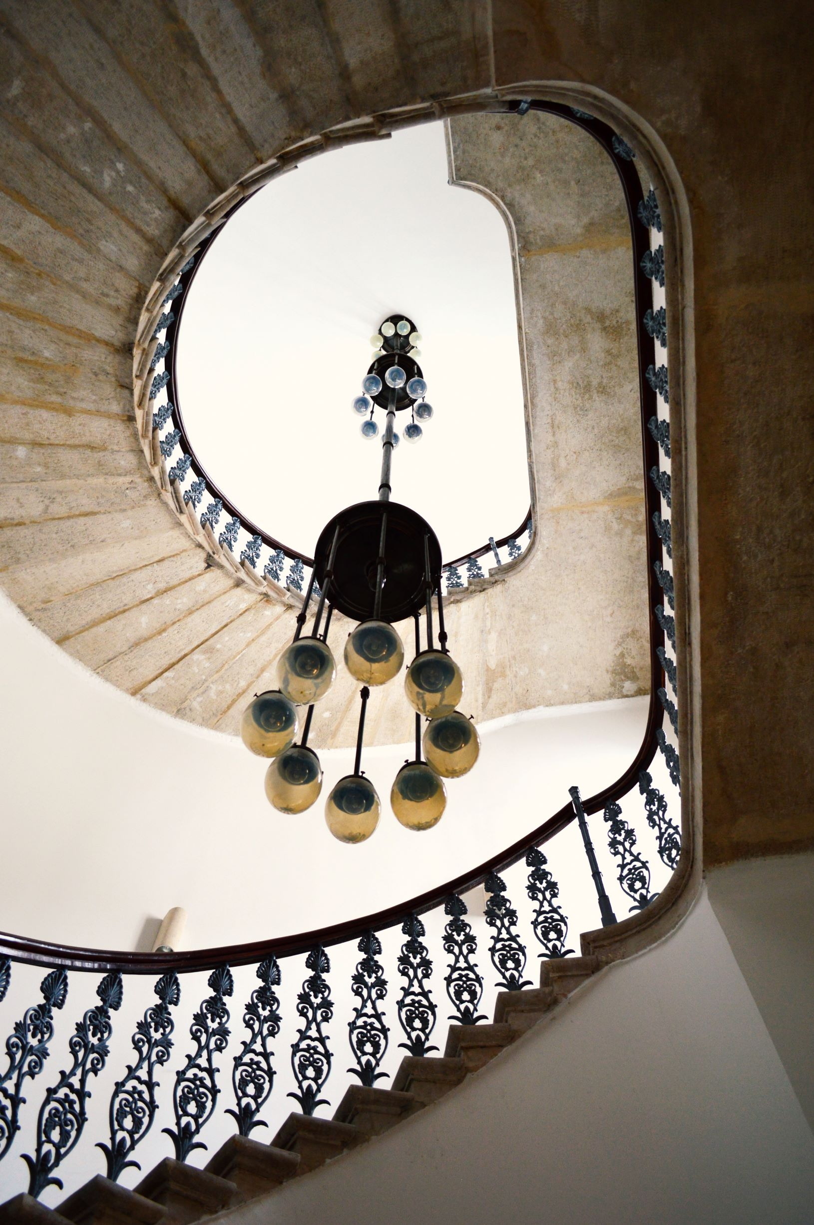 1085 Budapest, Gyulai Pál utca 13. EMET székhely, lépcsőház